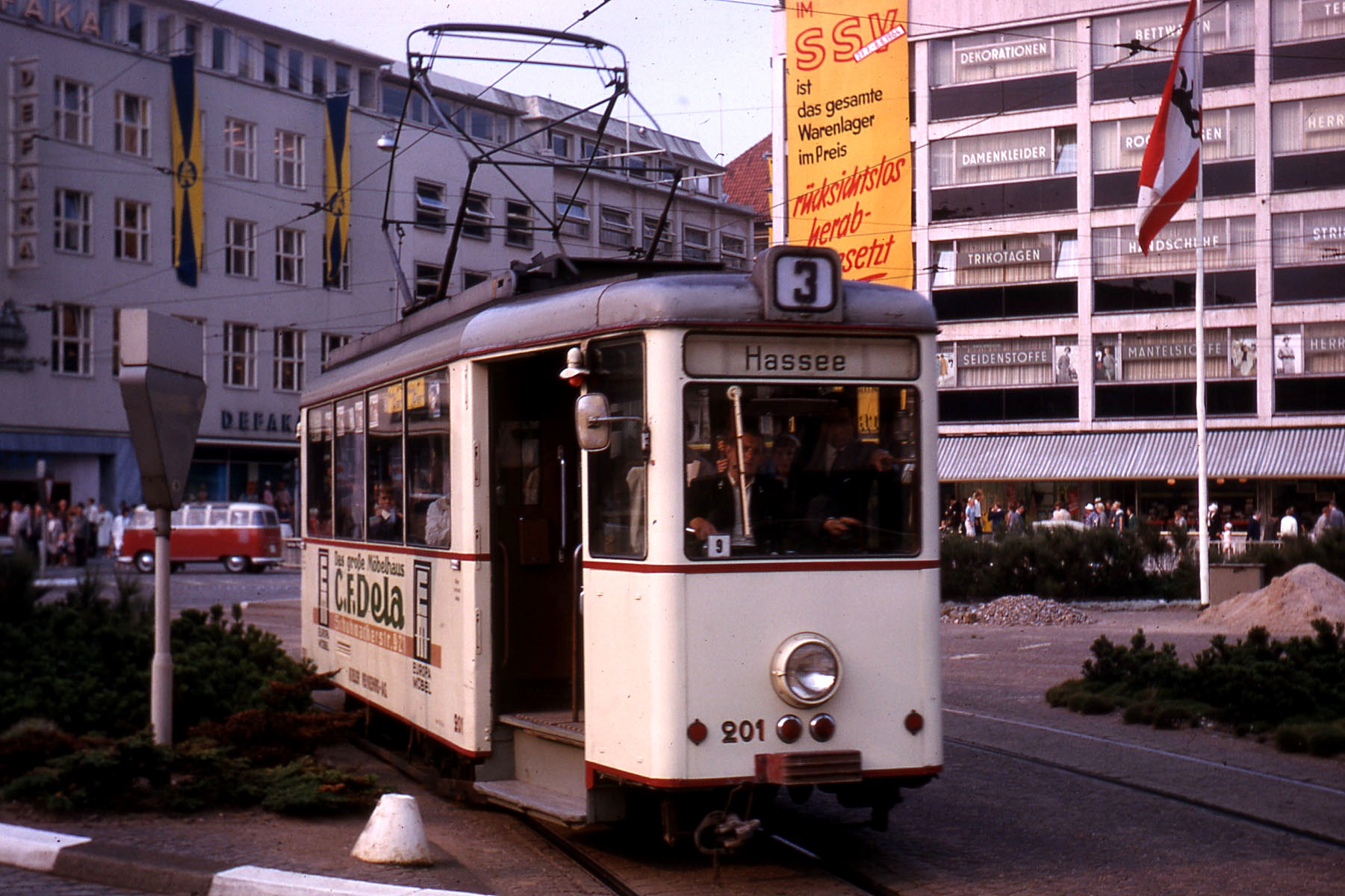 Straßenbahn Kiel, Wagen 201 auf Linie 3.